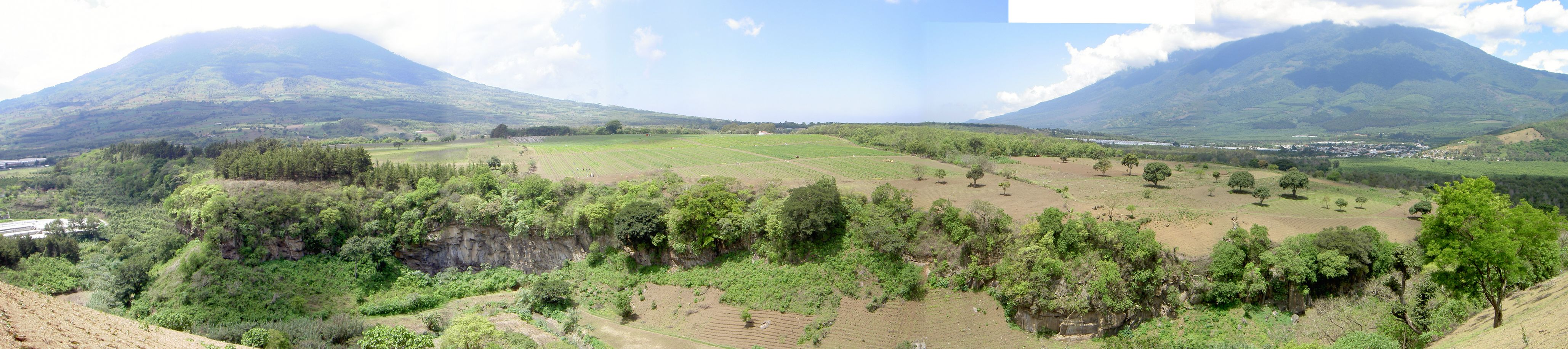 Vista panorámica del sitio rupestre de la Casa de Las Golondrinas